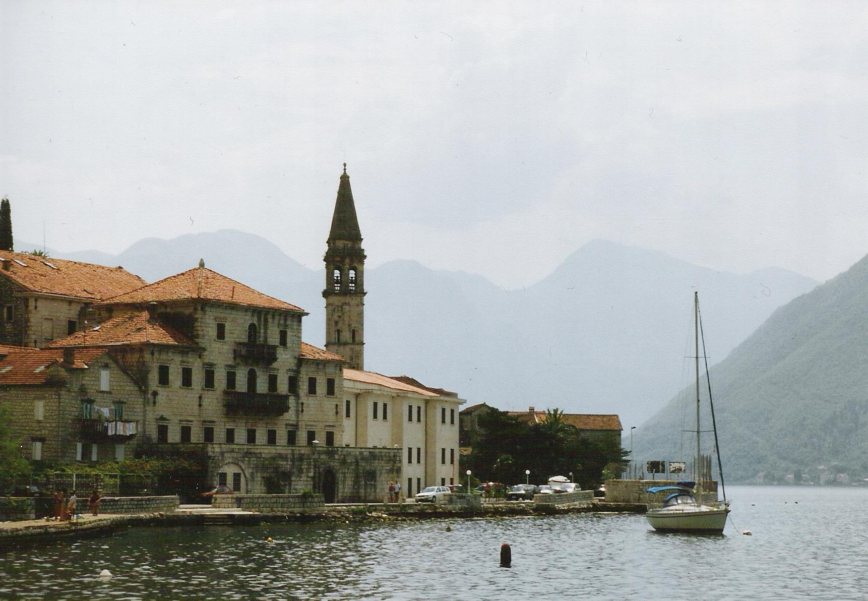 Perast an der Bucht von Kotor